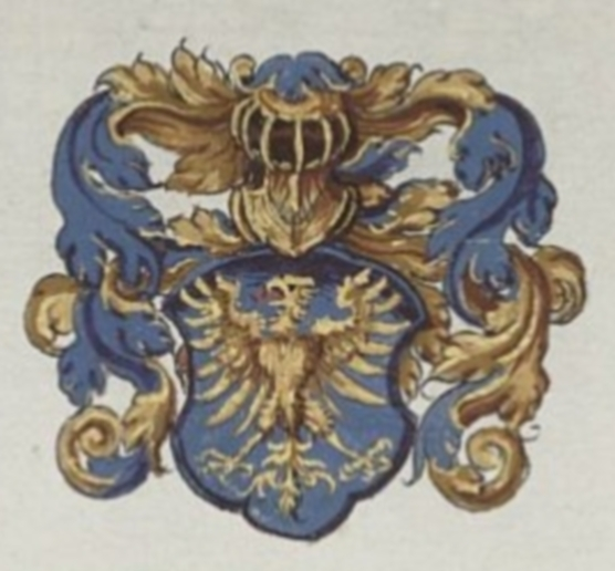 Wappen Heinrich III. von Berg, 1169-1172 Bischof von Passau, 1191-1197 Bischof von Würzburg